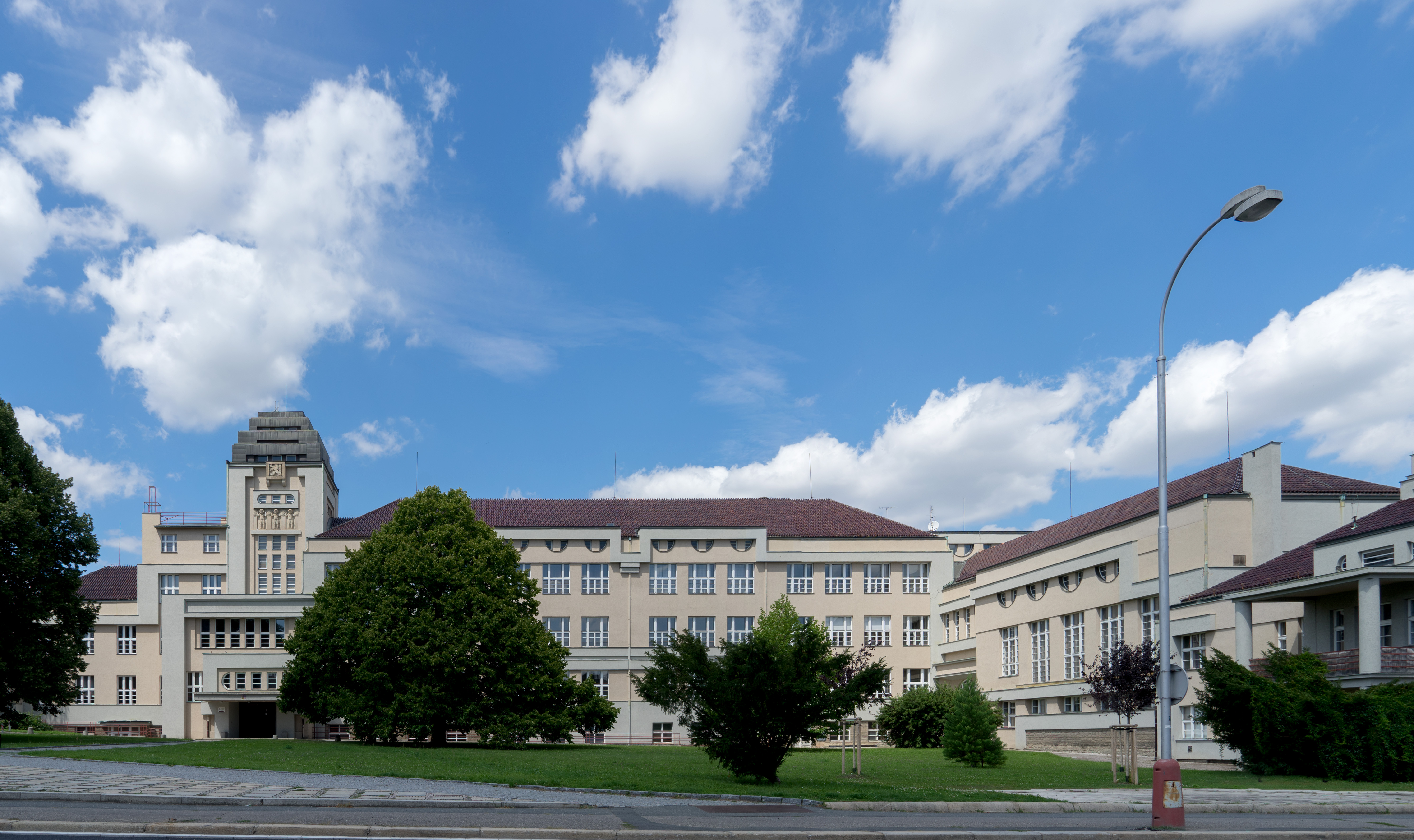 The school was constructed at the end of the 1920s (1924-1928) and designed by architect Rudolf Ryšánek. It is a top quality work of modern architecture. The building originally belonged to the Provincial Technical School and became the core of the newly developing town district Hlouška. The building is not accessible for public